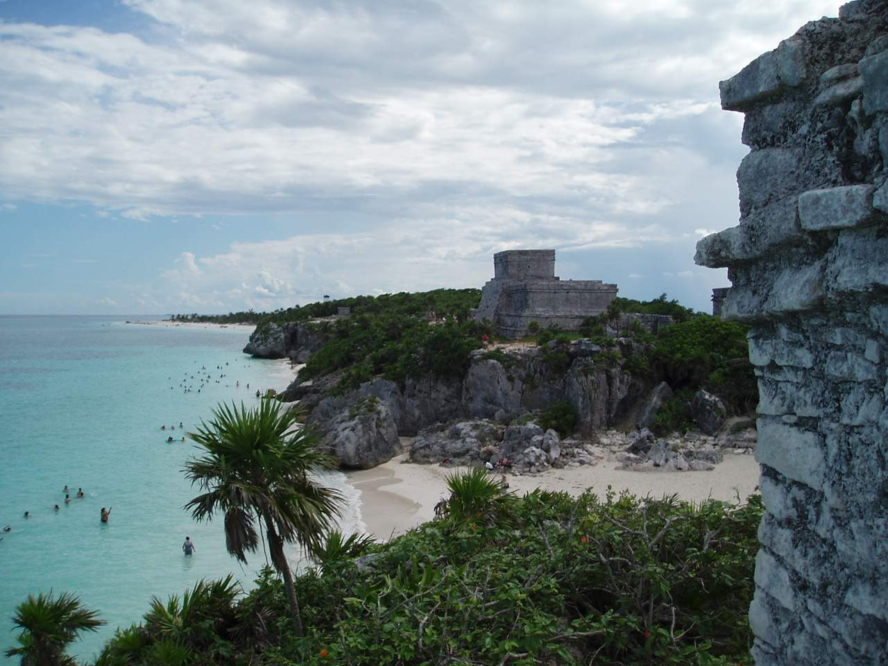 Ruins in Tulúm